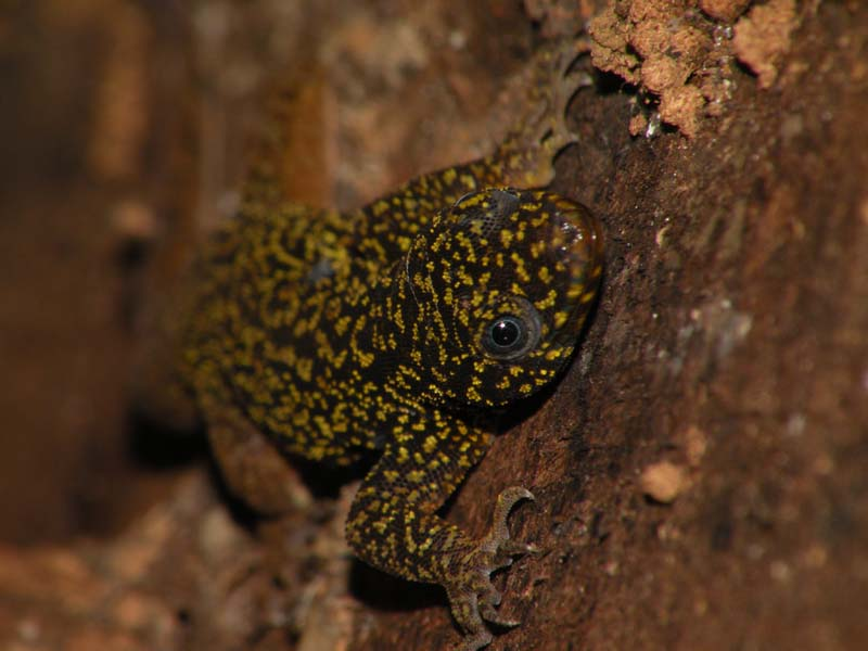 Gonatodes annularis - Guyane française (Observatoire ornithologique du sentier de la Mirande, Mont Grand-Matoury, Matoury))